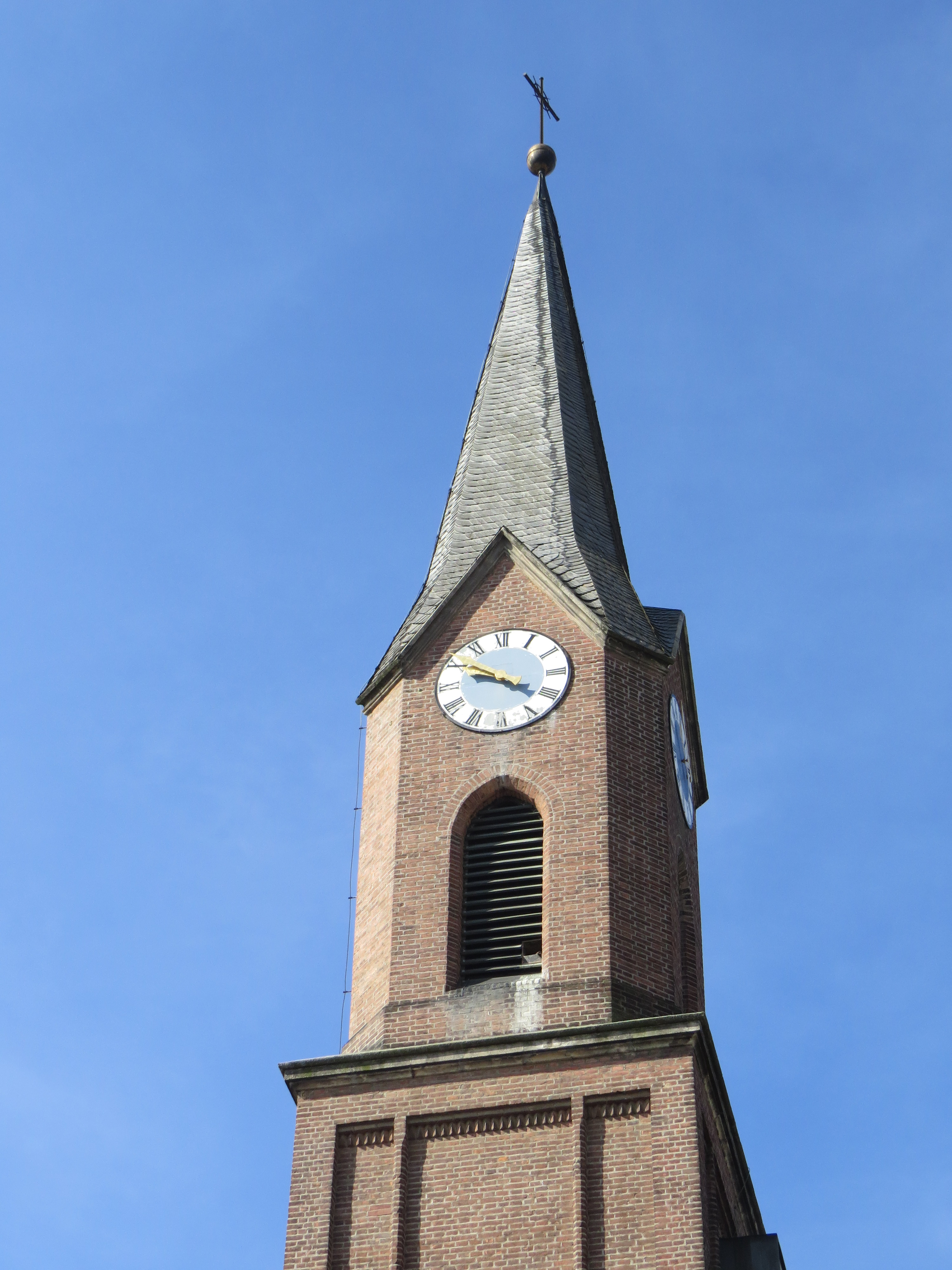 Petruskirche Neu-Ulm, Kirchturmspitze